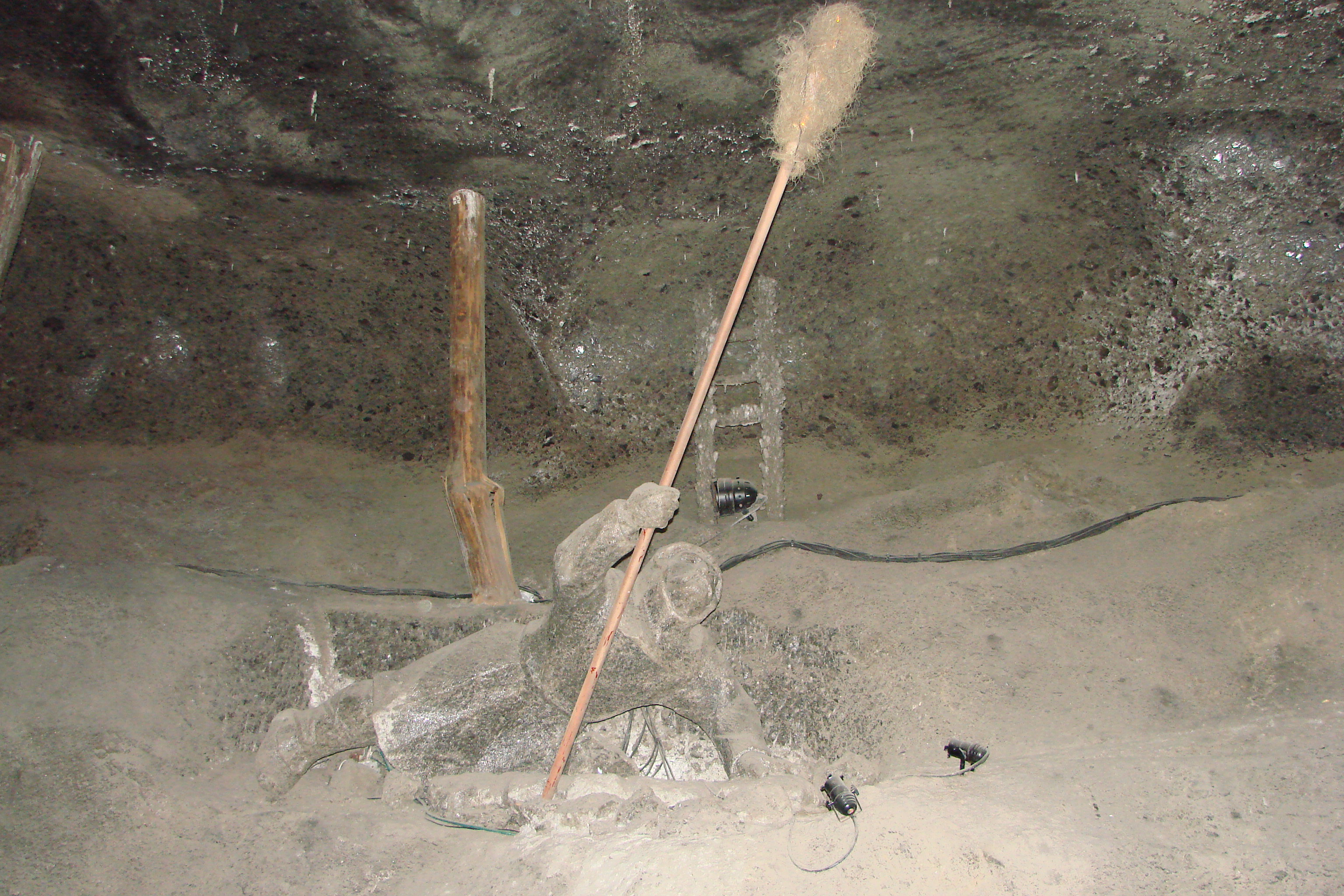 Wieliczka, Poland